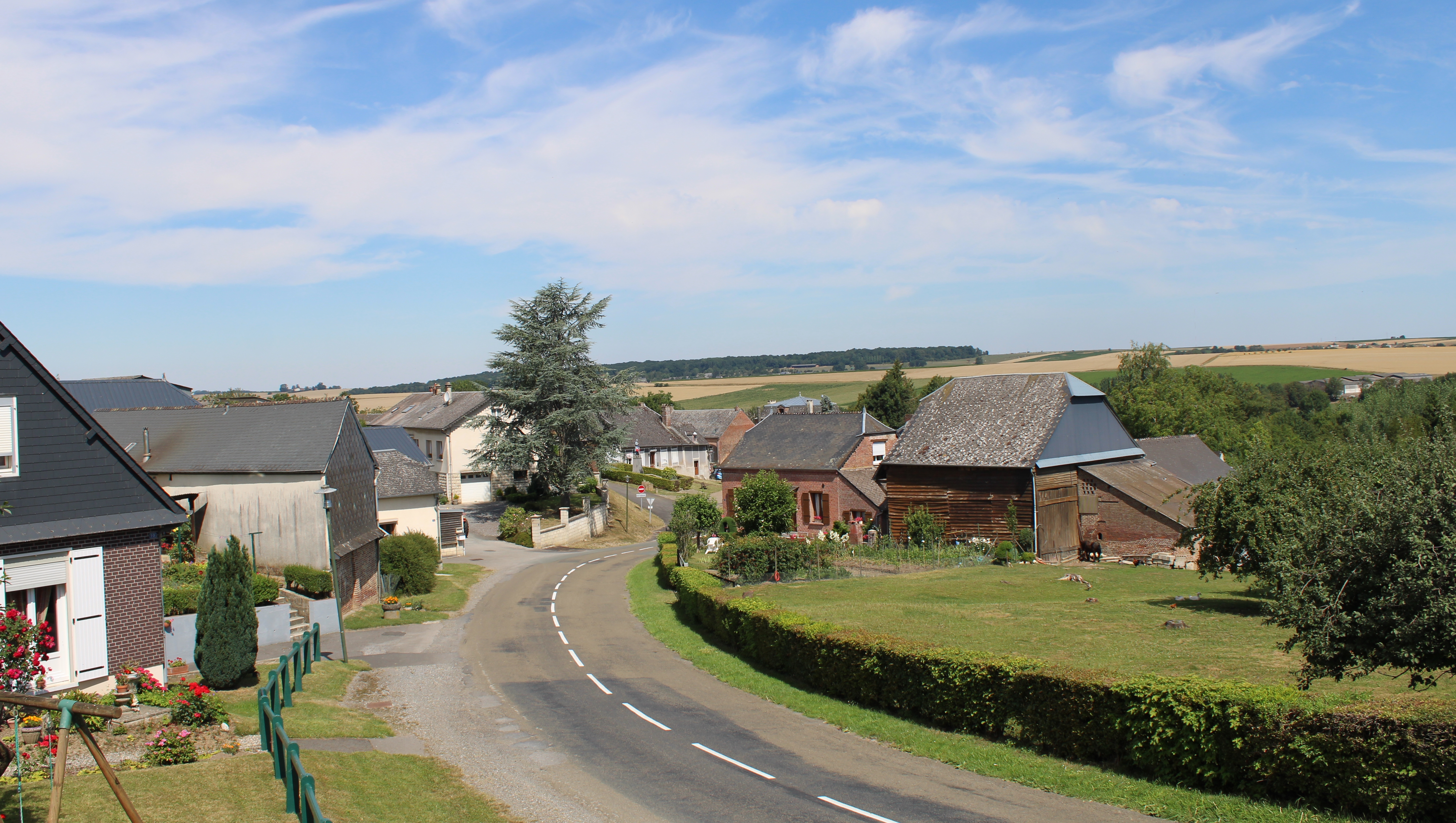 Vue du village depuis les hauteurs de l'église.